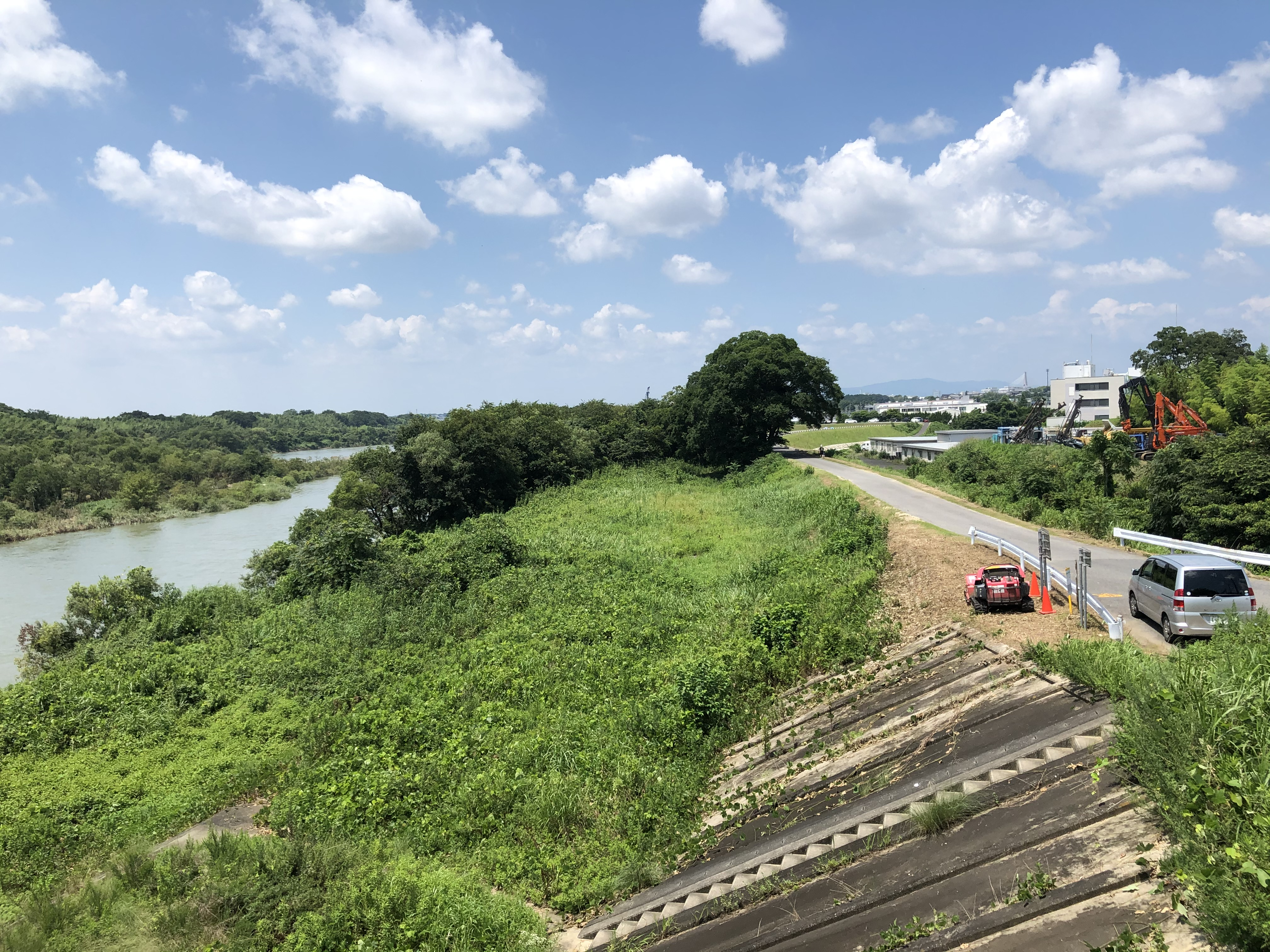 矢作川の河川敷、天神橋付近、岡崎市岩津町。